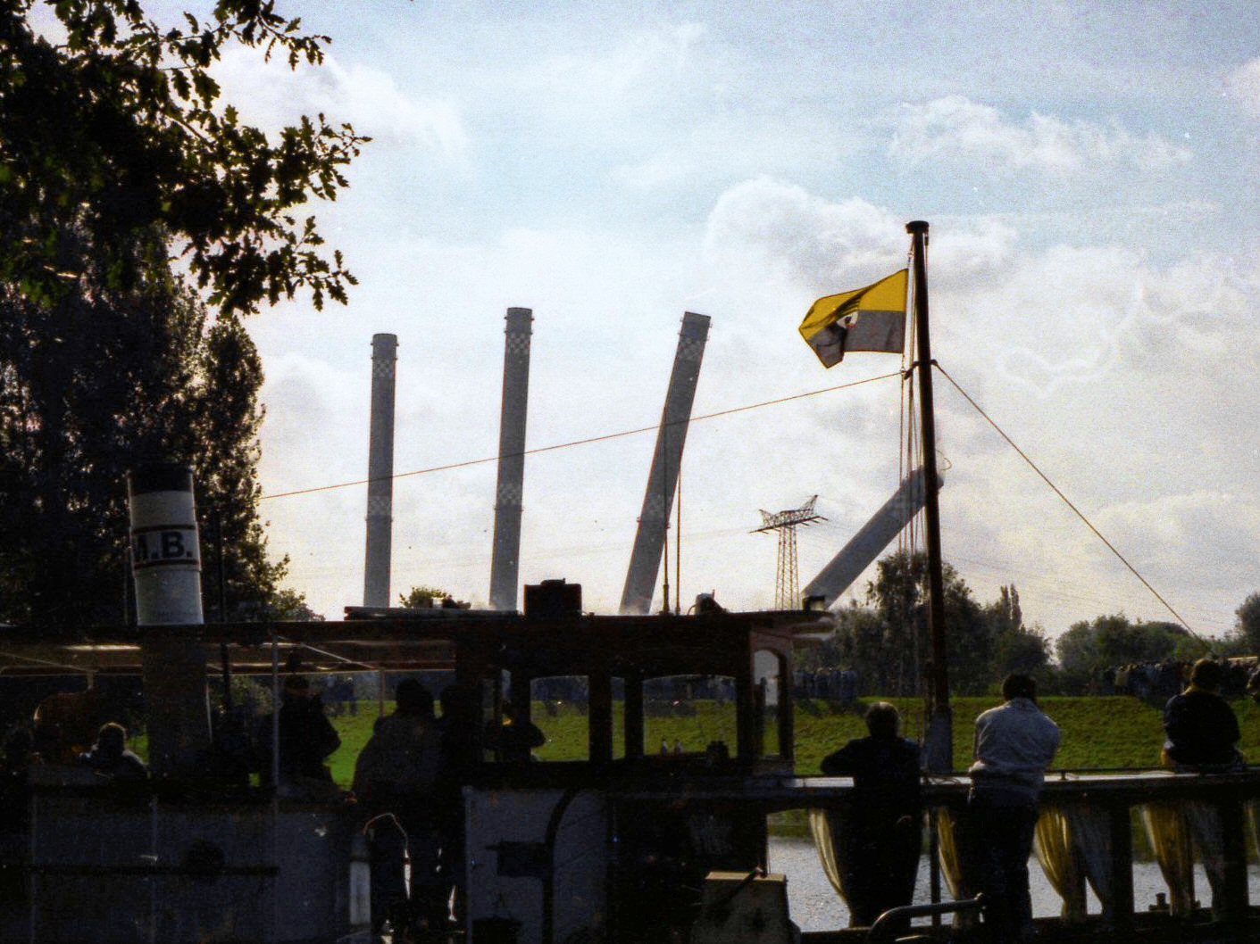 Kraftwerk Vockerode, 2001, Sprengung der 4 Schornsteine, 12:00 Uhr